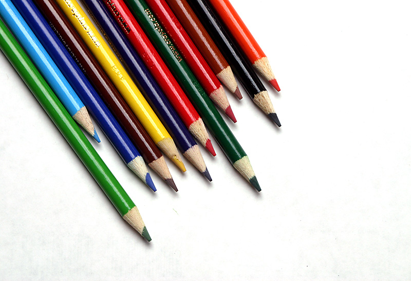 Kelvin Kay user:kkmd